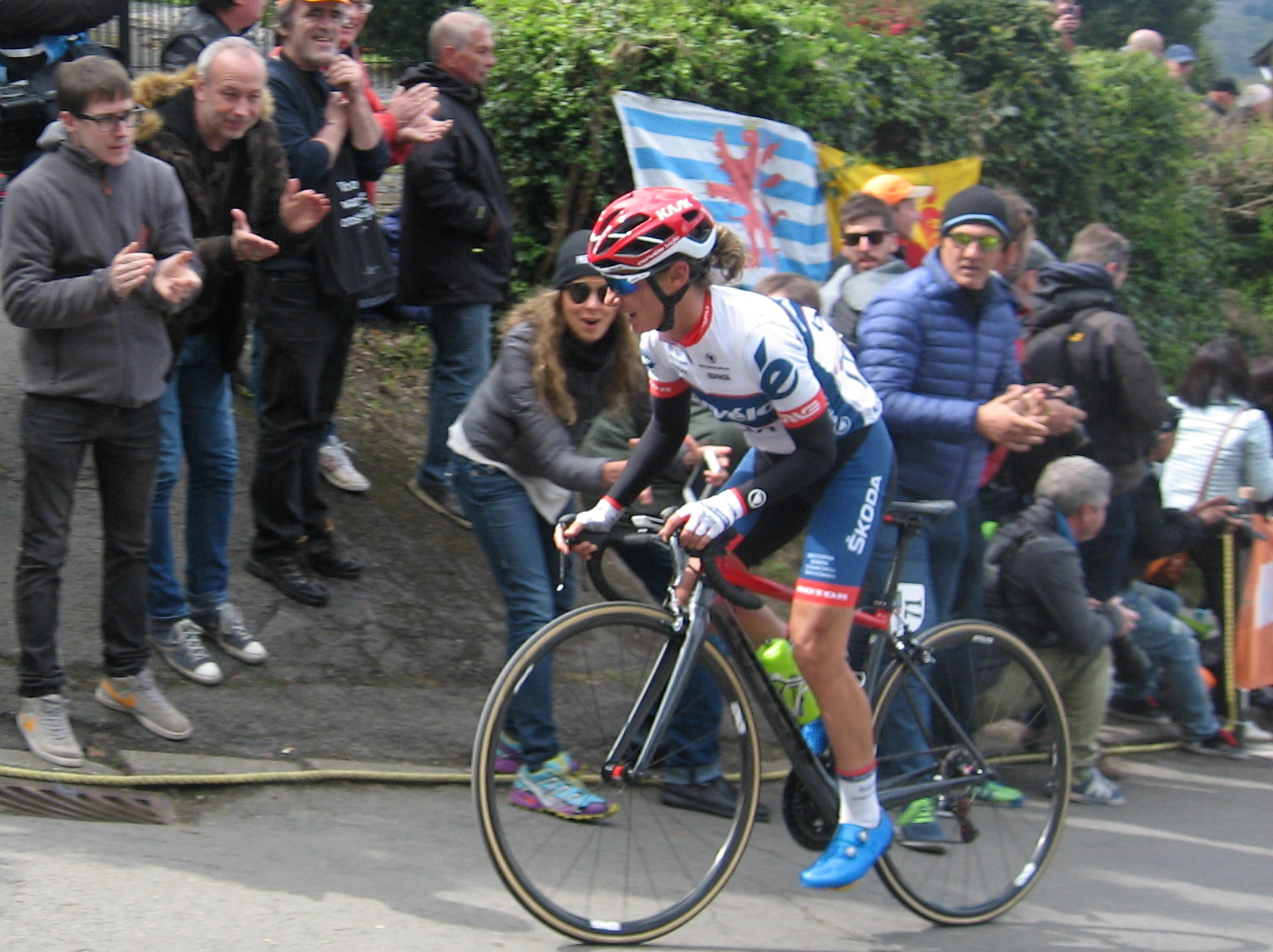 Ashleigh Moolman (Cervélo-Bigla) in de Waalse Pijl 2017